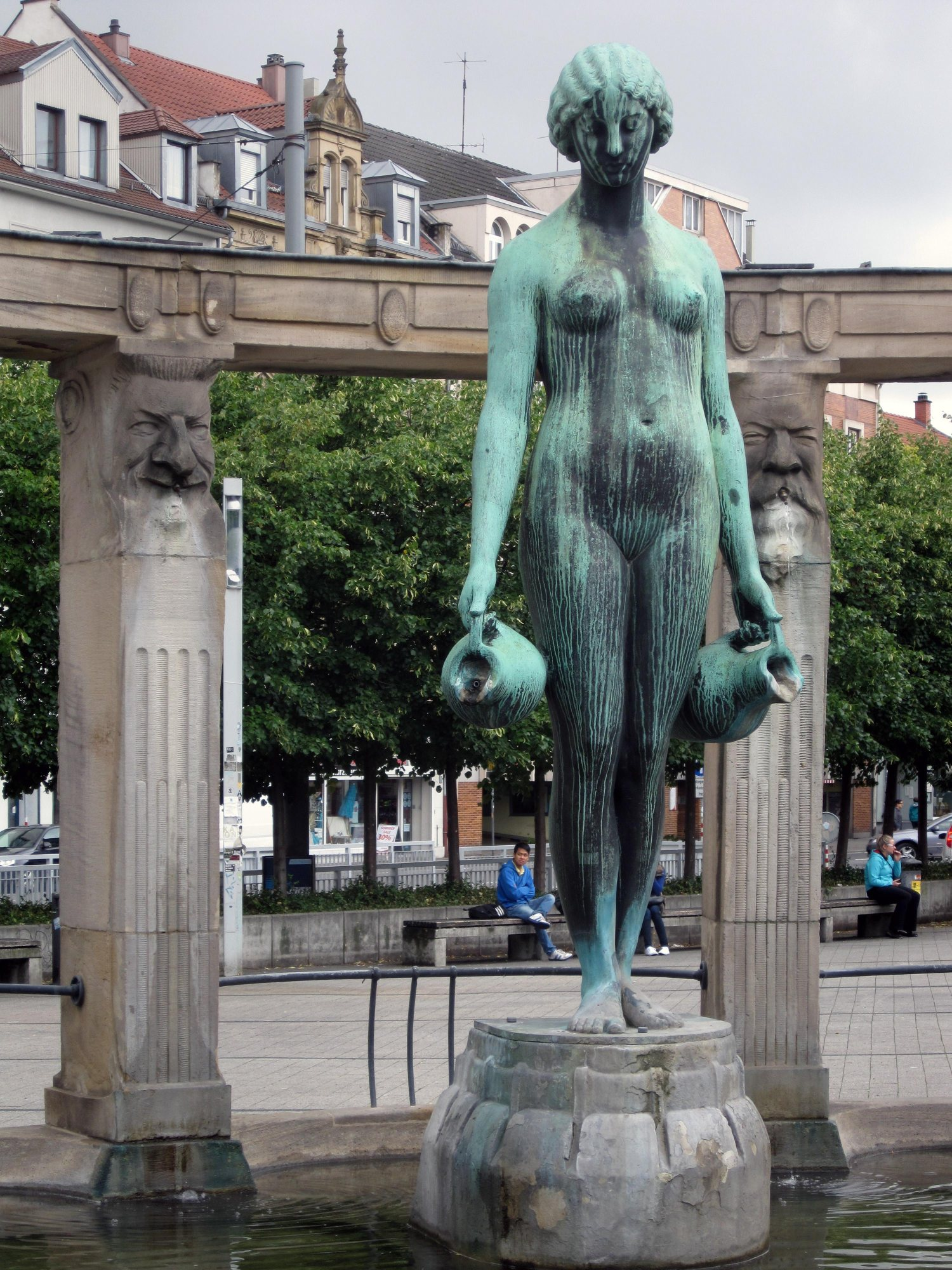 Kalrsruhe, Stephaniebrunnen, Hauptfigur Foto: 2014